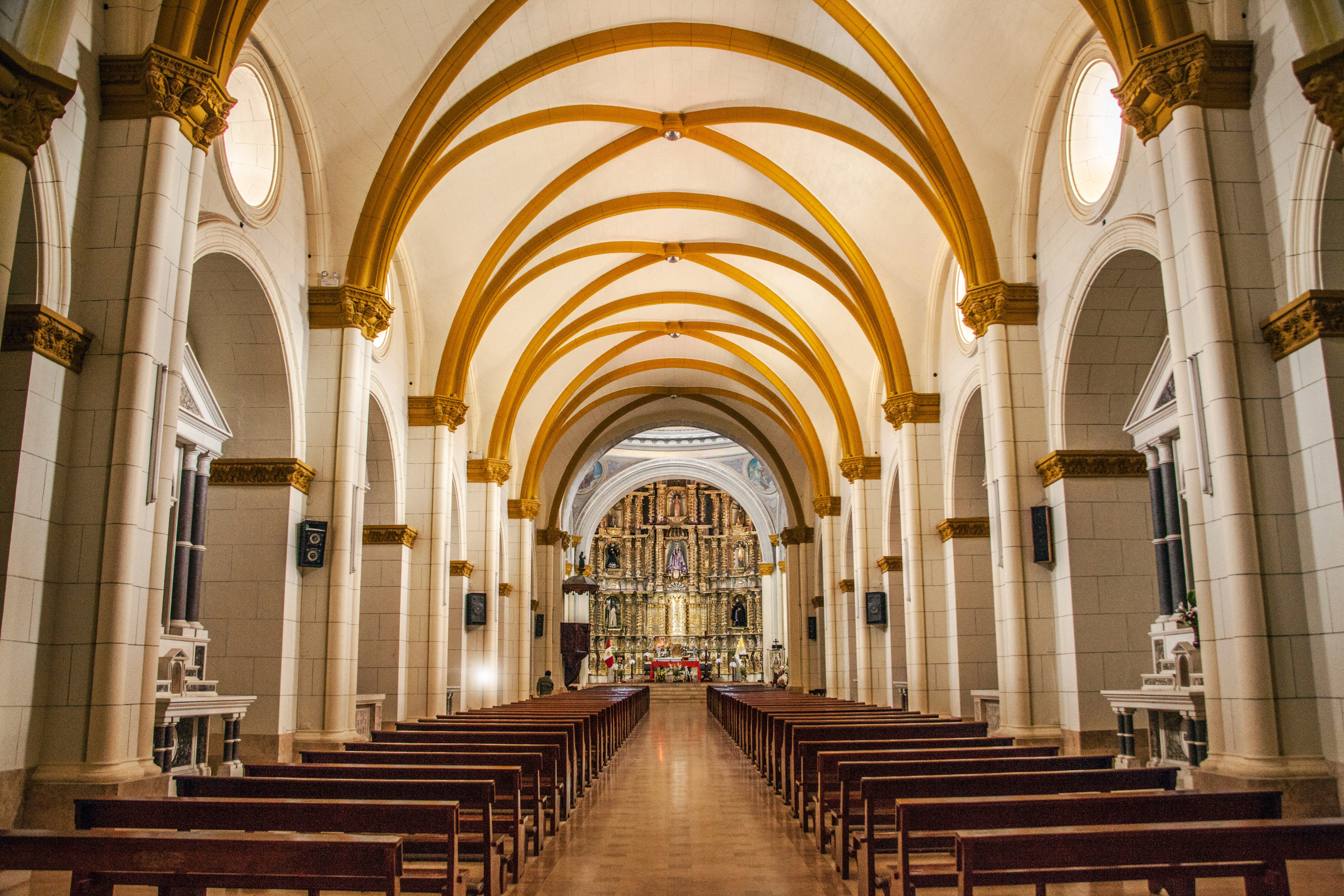 Interior de la Iglesia Matriz, mandada a construir por Francisco Pizarro.